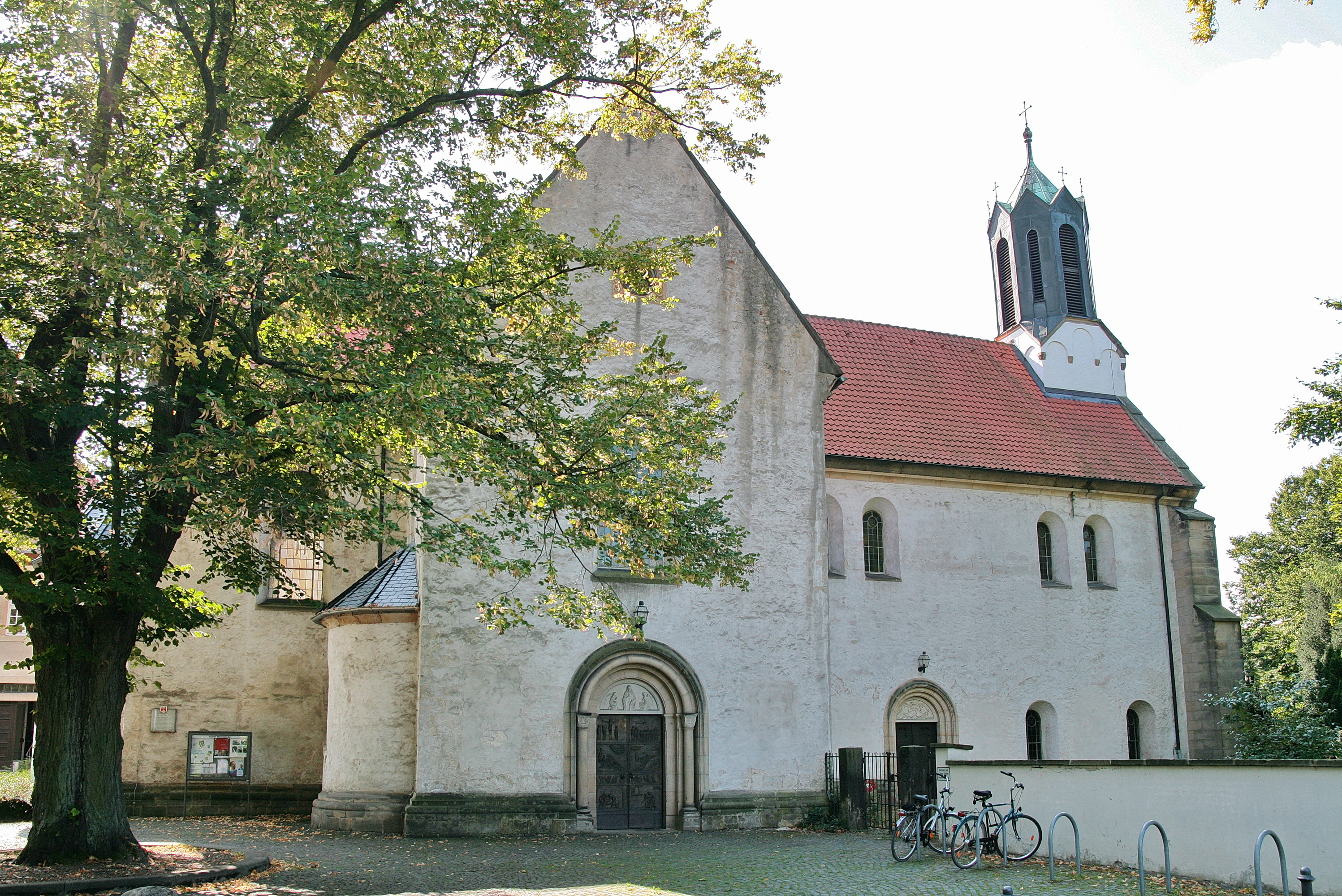 Das Kloster Marienwerder in Marienwerder (Hannover), Niedersachsen, Deutschland, wurde 1196 als Familienstiftung der Grafen von Roden gegründet. Die Grafen waren die ersten Stadtherren von Hannover. Die Kirche von ca. 1200 wurde 1858-1861 restauriert. Die derzeitige Klosteranlage entstammt dem 17./18. Jahrhundert.